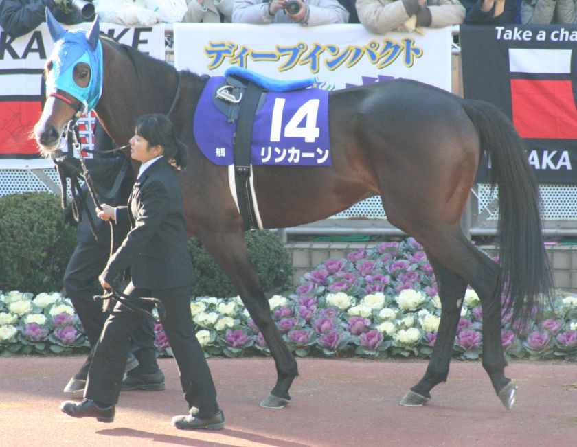 リンカーン（競走馬、中山競馬場パドックにて撮影）